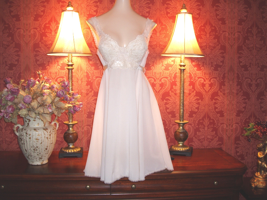 babydoll nightie